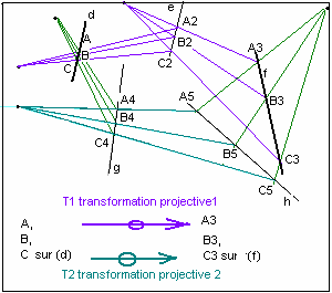 figure géométrique du th fondamental de la géométrie projective créée par michelbailly le 03012006